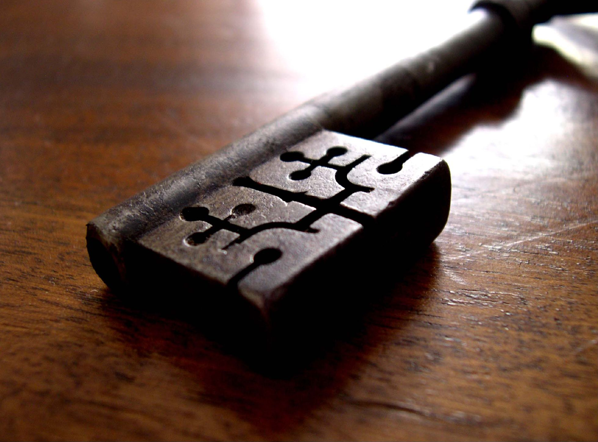 Key